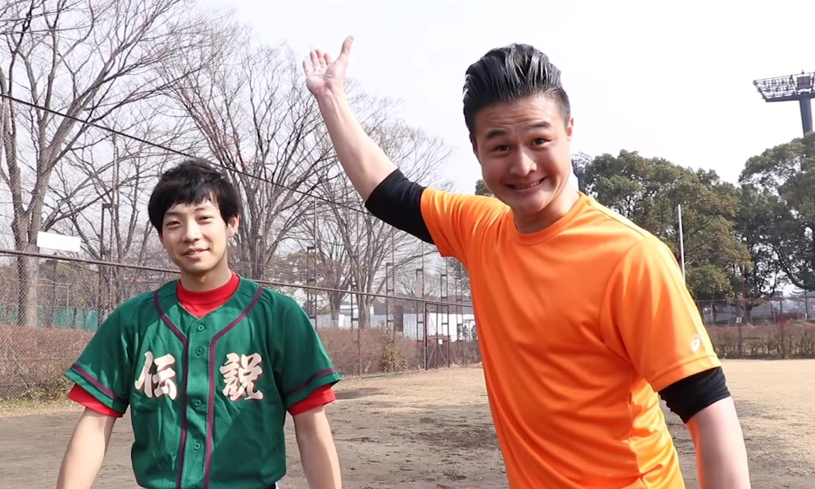 YouTubeチャンネル「クニヨシTV」に出演するお笑いコンビ・ティモンディ（前田・高岸）